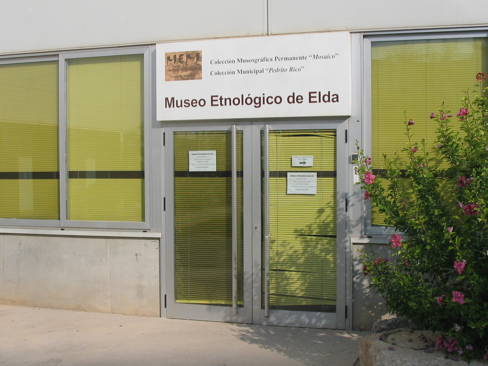 Fotografía de la entrada del Museo Etnológico de Elda, Alicante, España.